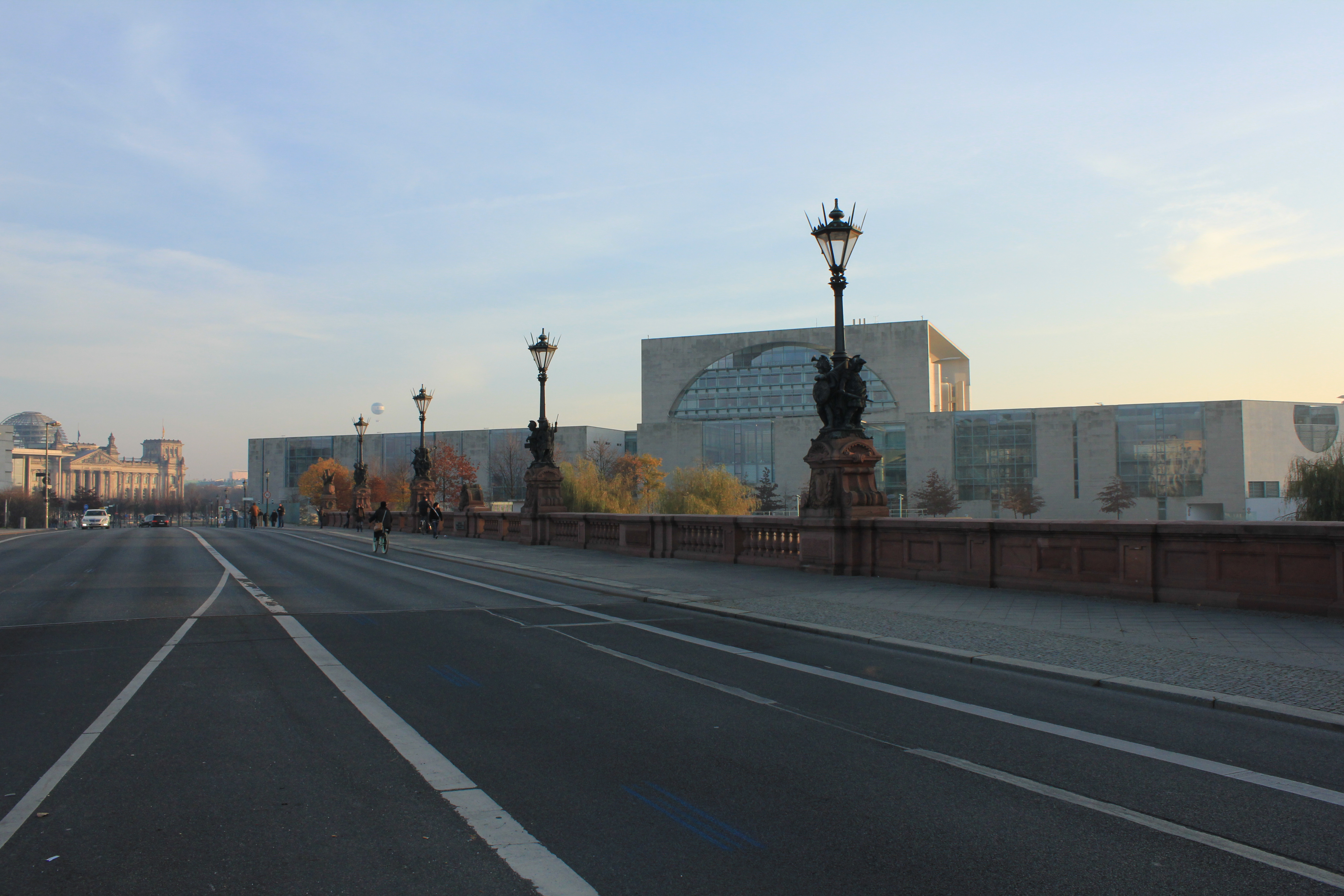 Moltkebrücke